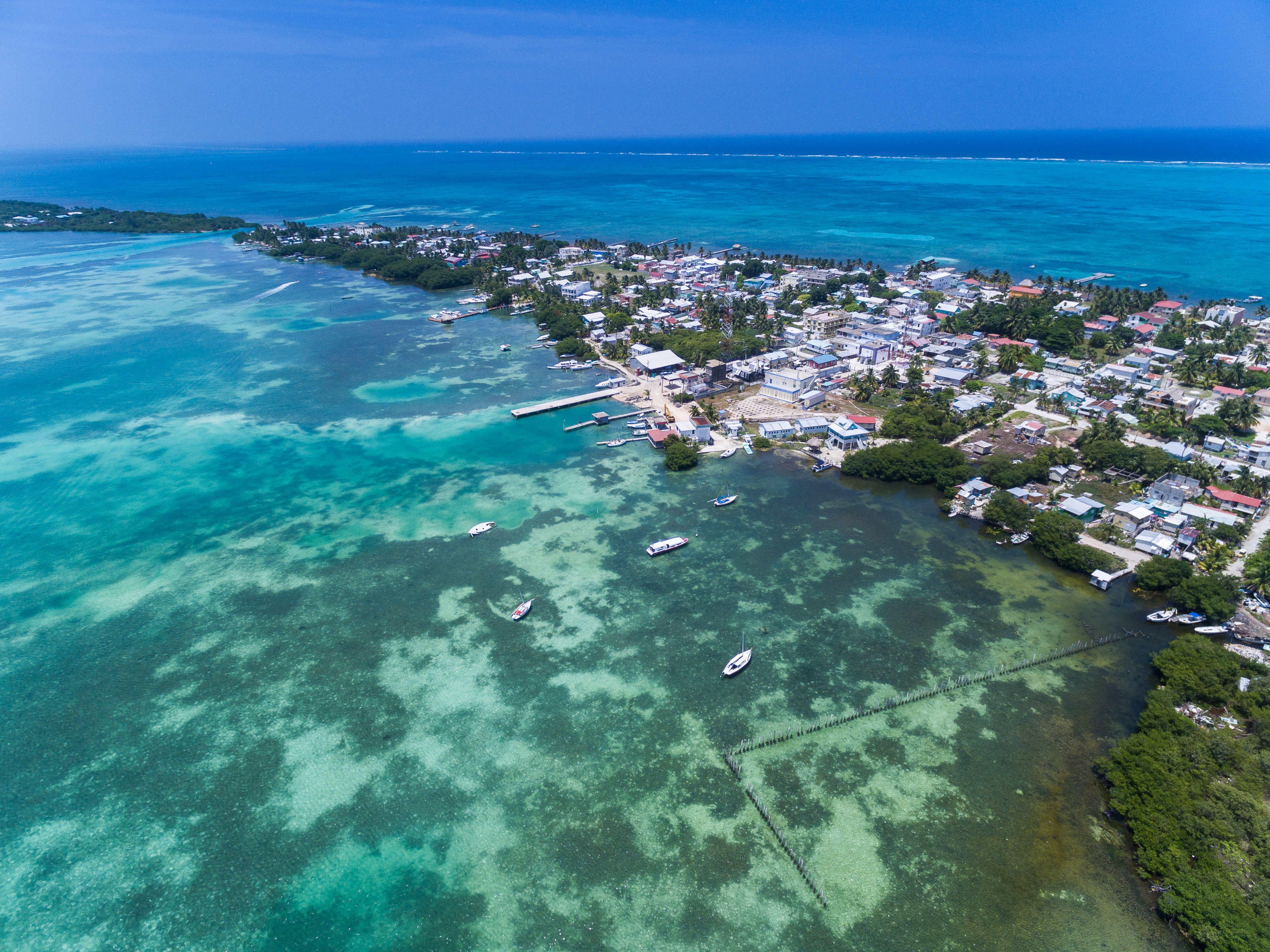 beautiful island in Belize, Caye Caulker